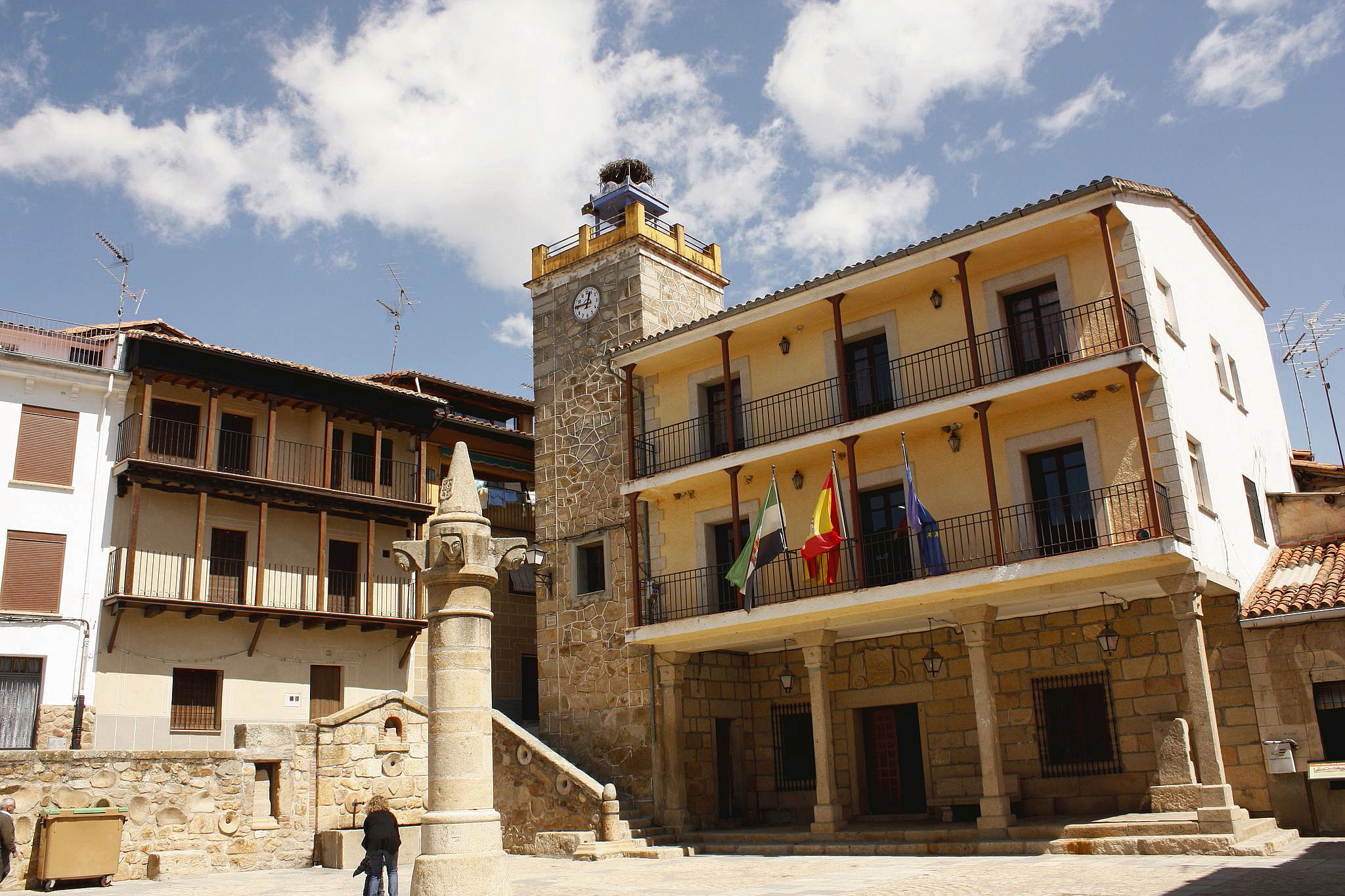 Ayuntamiento de Pasarón de la Vera, provincia de Cáceres, España.